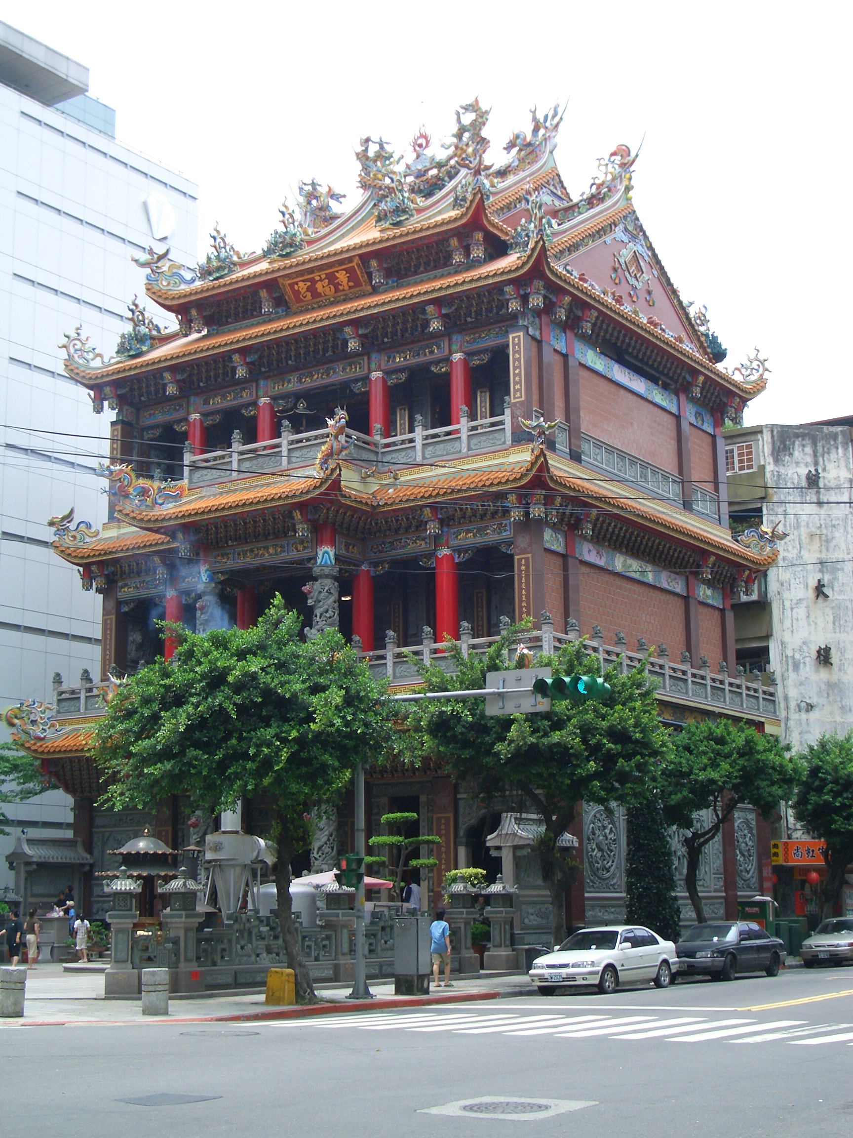 台北市景福宮為一土地廟，位於中華民國臺灣臺北市中山區德惠街11號。